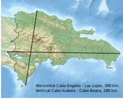 Kopie van 220px-Dominican_Republic_relief_location_map met gemerkte lengte en breedte